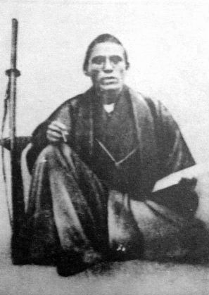 a Japanese man 大久保利通 (Toshimichi Okubo)